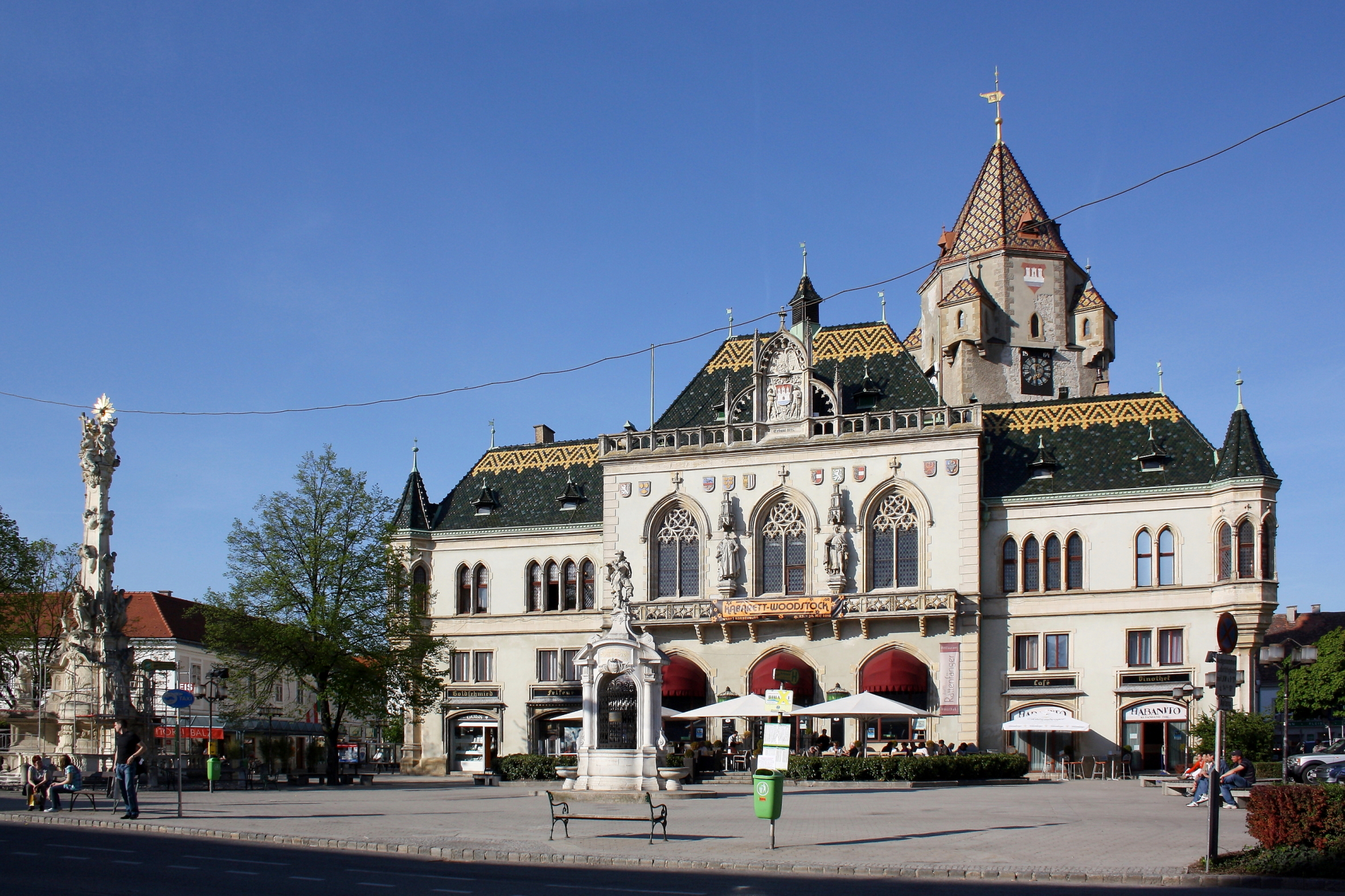 Das neogotische Rathaus in der niederösterreichischen Stadt Korneuburg. Davor der "Rattenfängerbrunnen" und dahinter der spätgotische Stadtturm aus der Mitte des 15. Jahrhunderts.